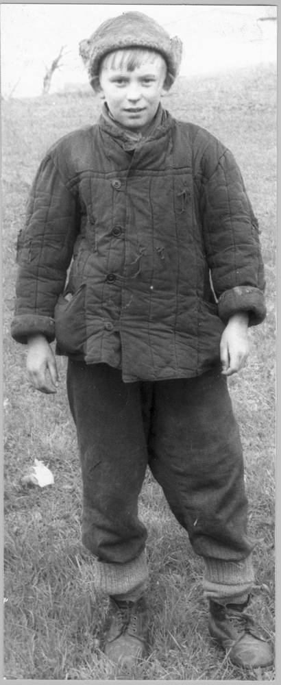 Ученик 7 класса переславской школы № 1 Александр Юрьевич Журавлёв (1963 года рождения) в роли мальчика Егорки в перерыве между съёмками кинофильма «Ливень» близ города Переславля.